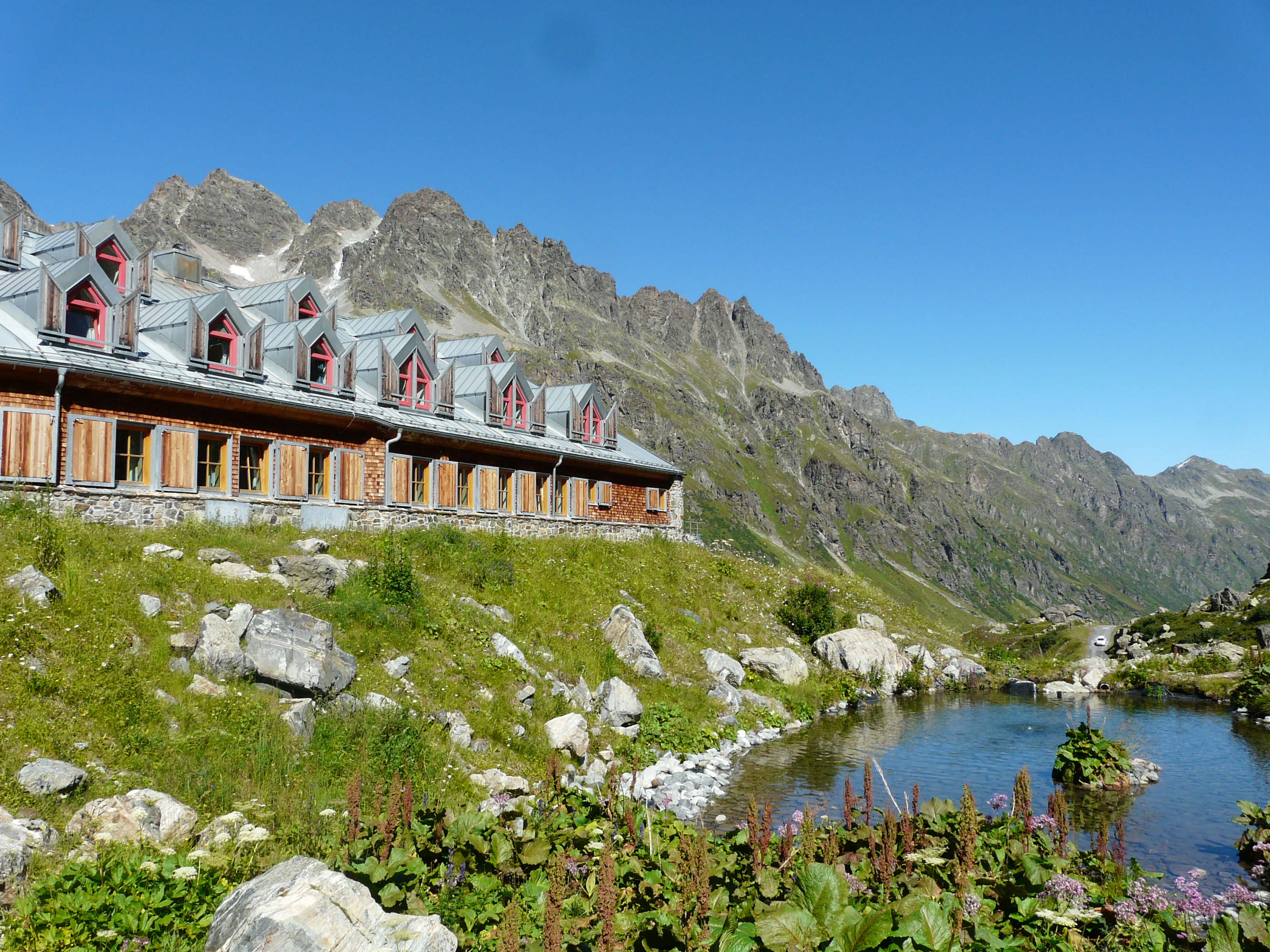 Jamtalhütte mit Teich